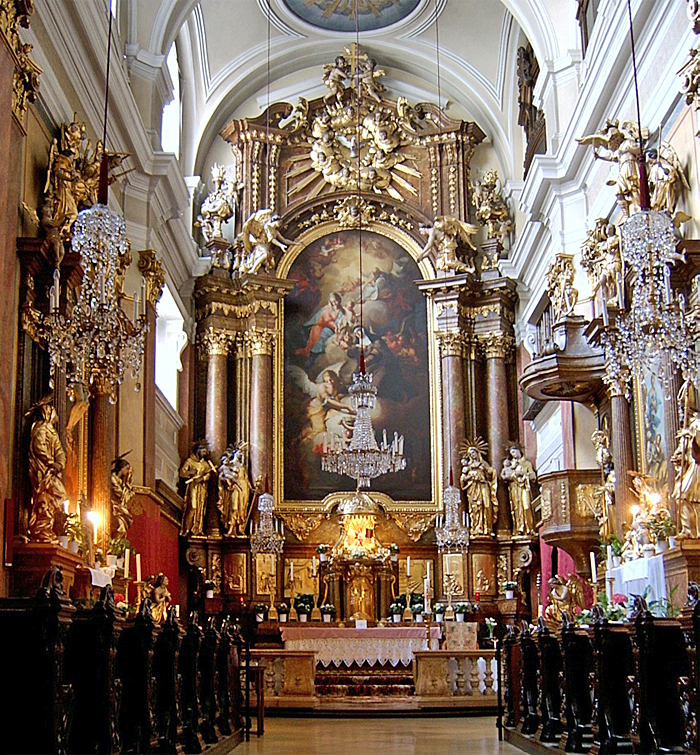 Elisabethinenkirche Wien. Inneres.